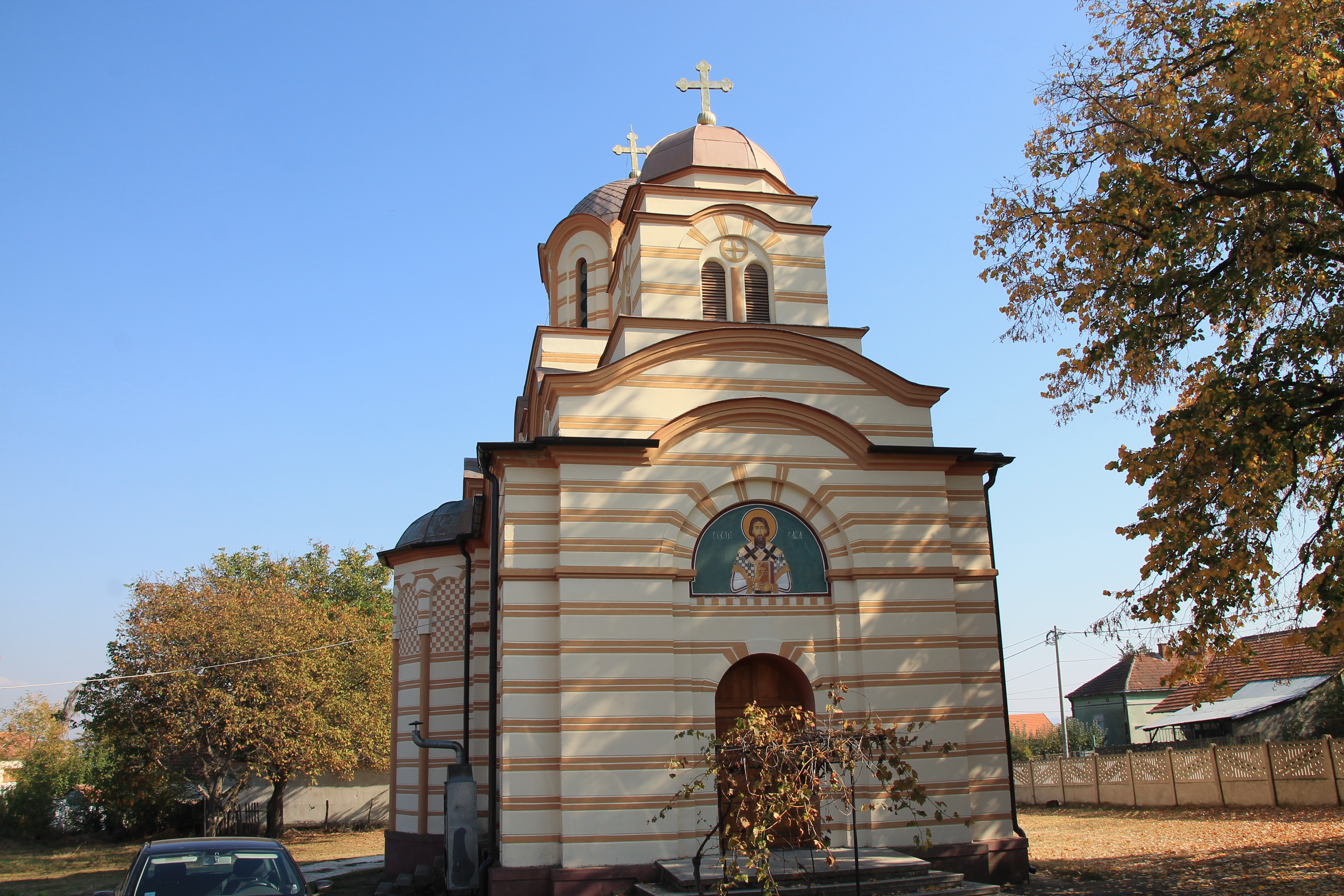 Crkva Sv. Save (Siokovac)